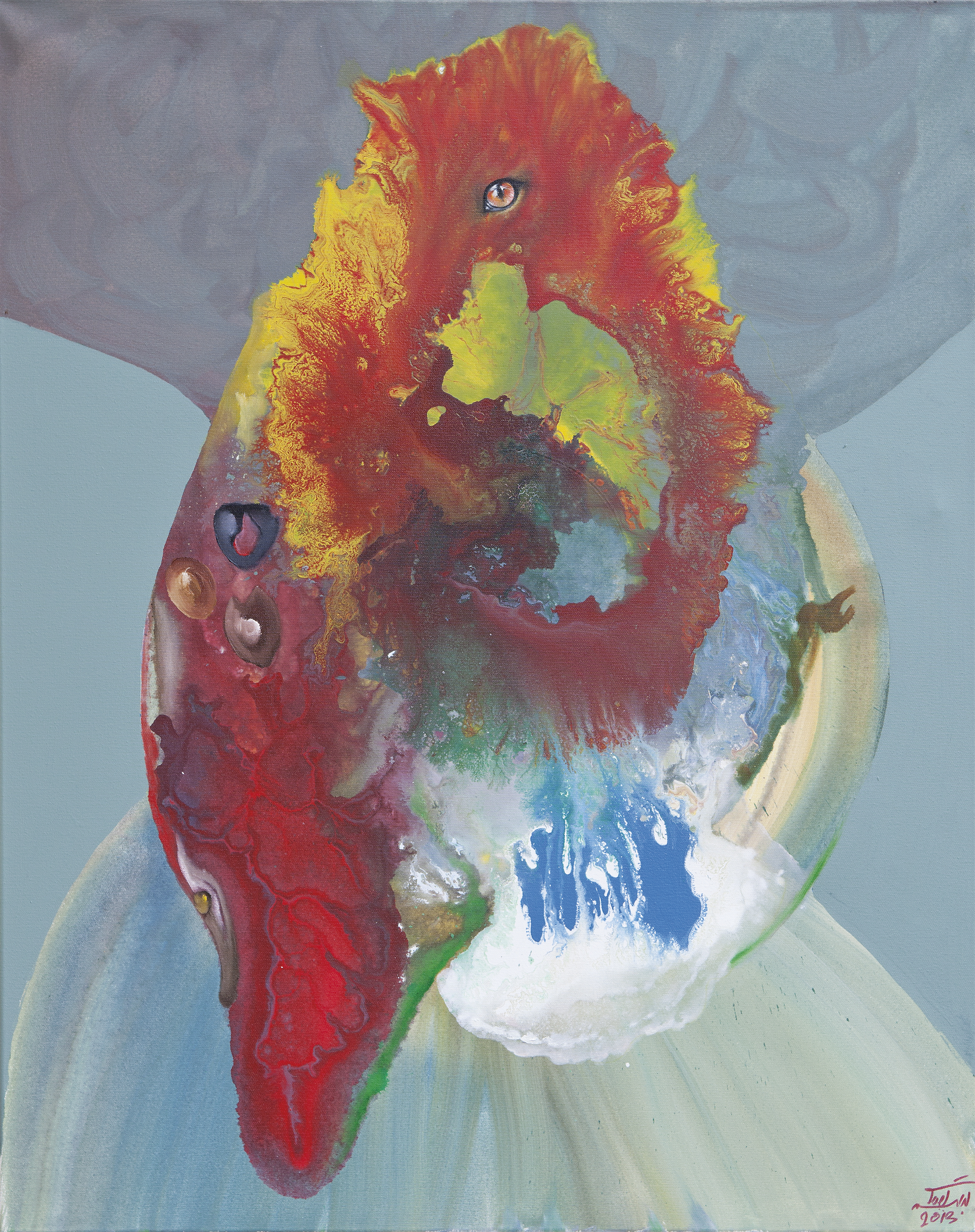 Ebrahim Ehrari, Der Fuchs von Ganca, 2013, Öl und Acryl auf Leinwand, 100x150cm